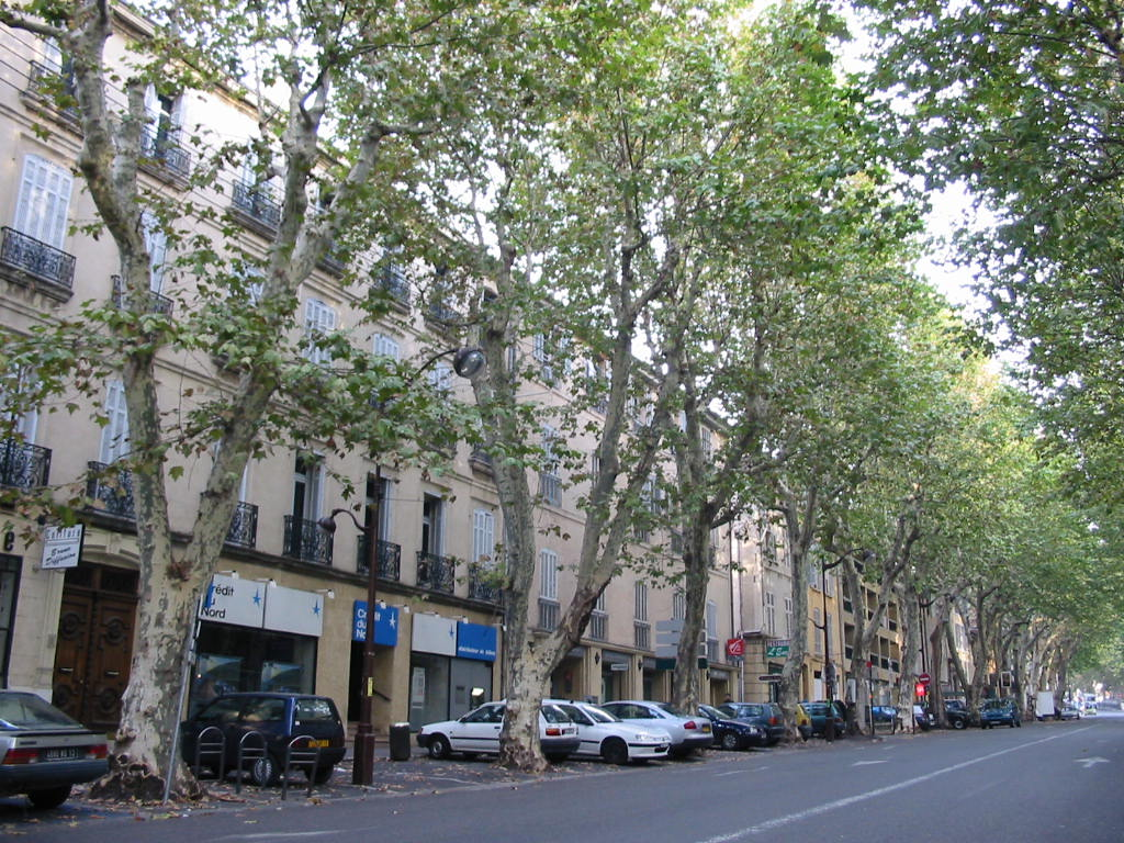 Cours Sextius à Aix-en-Provence (France)